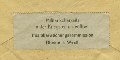 Rückseite eines Feldpostbriefes vom 16. September 1918 (geöffnet und mit Papiersiegel wieder verschlossen)